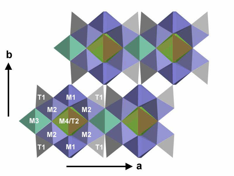 Staurolithstruktur: Blick entlang der c-Achse auf die a-b-Ebene M1A,B-Oktaeder: blau M2-Oktaeder: hell-violett T1-Tetraeder: hell-grau M3-Oktaeder: hell-türkies M4-Oktaeder: grün